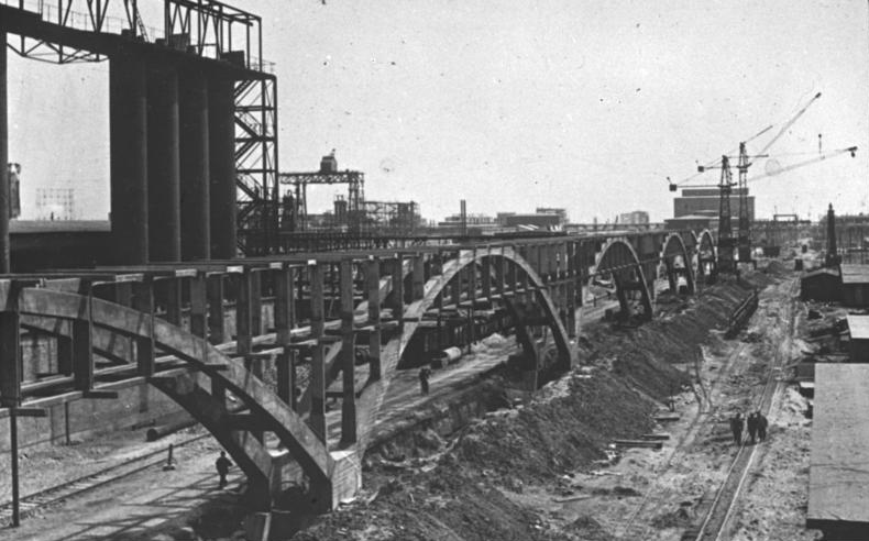 17 Rohrbrücken